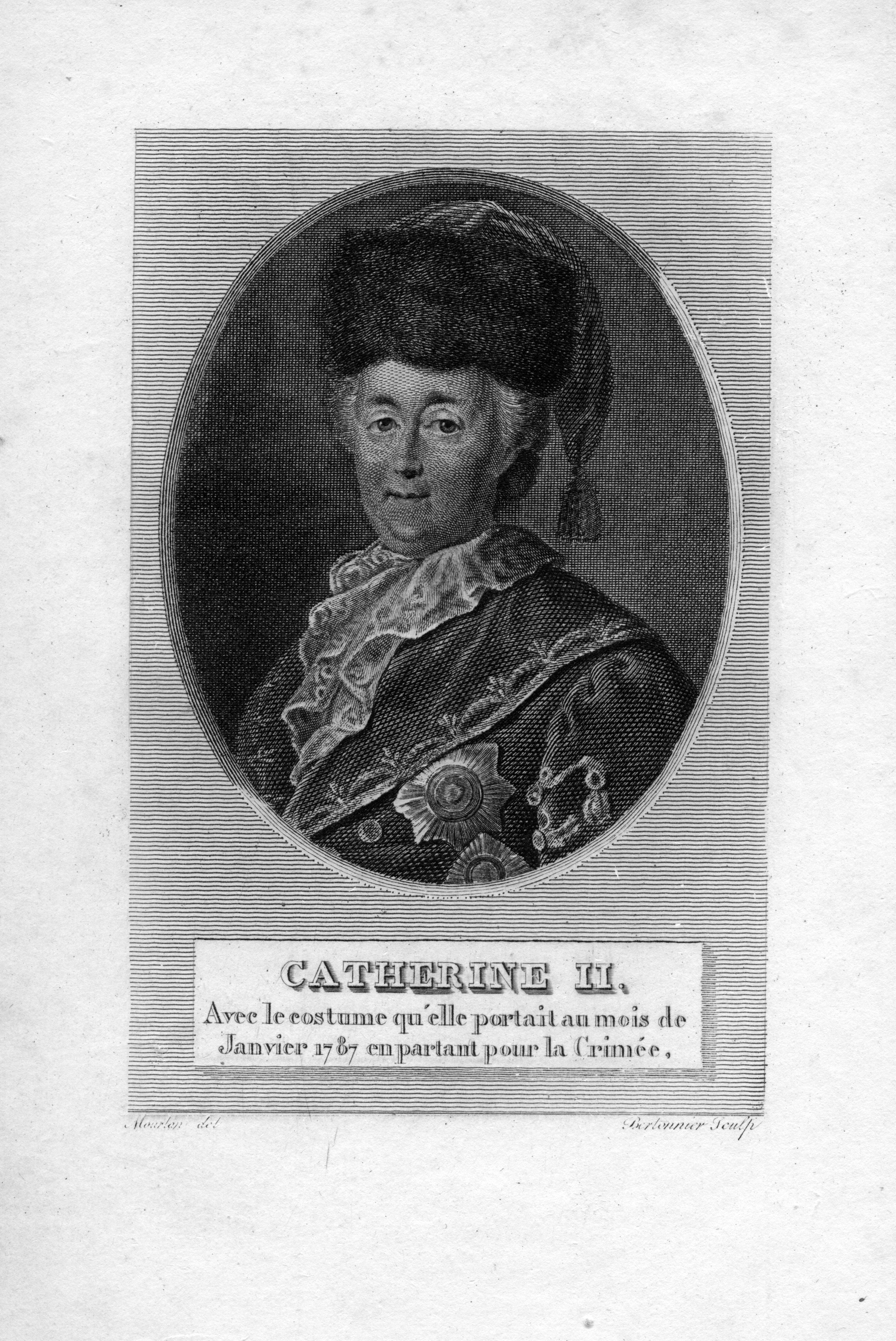 portrait gravé